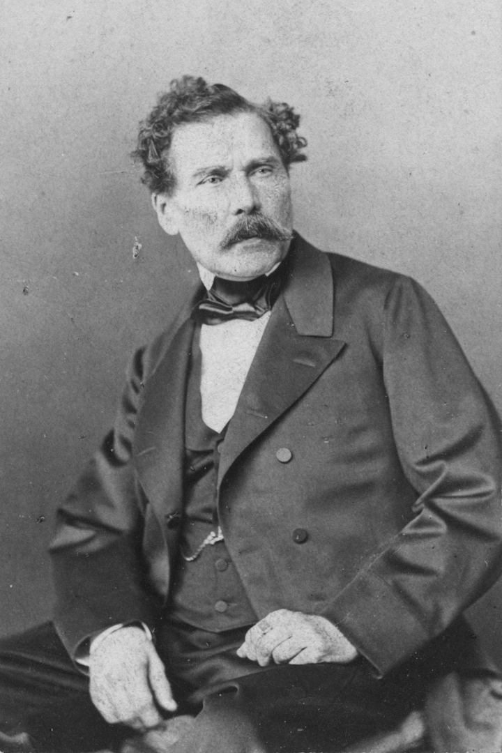 Portrait von Philipp Draexler von Carin